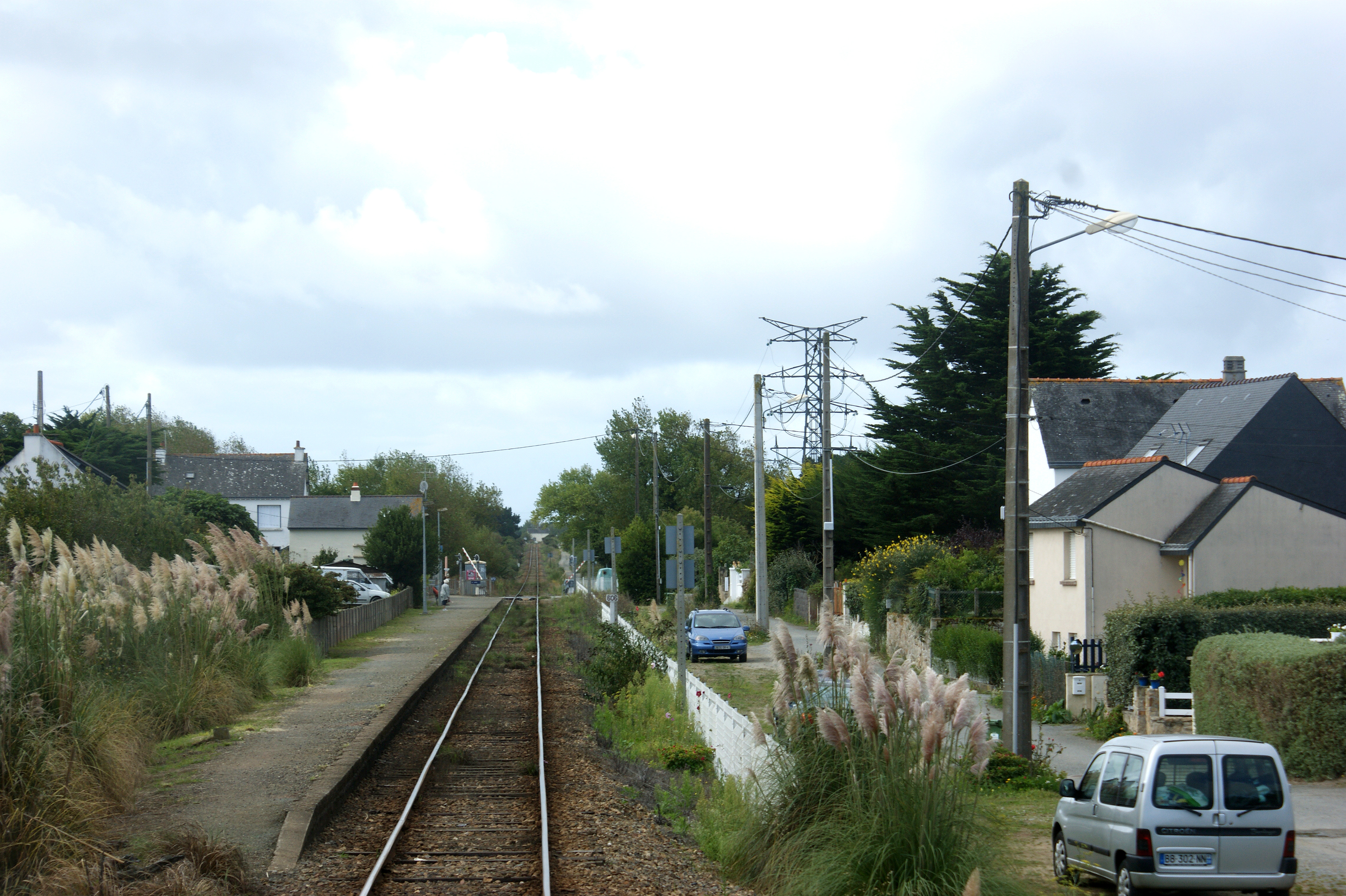 La halte vue de la cabine du Tire-bouchon.